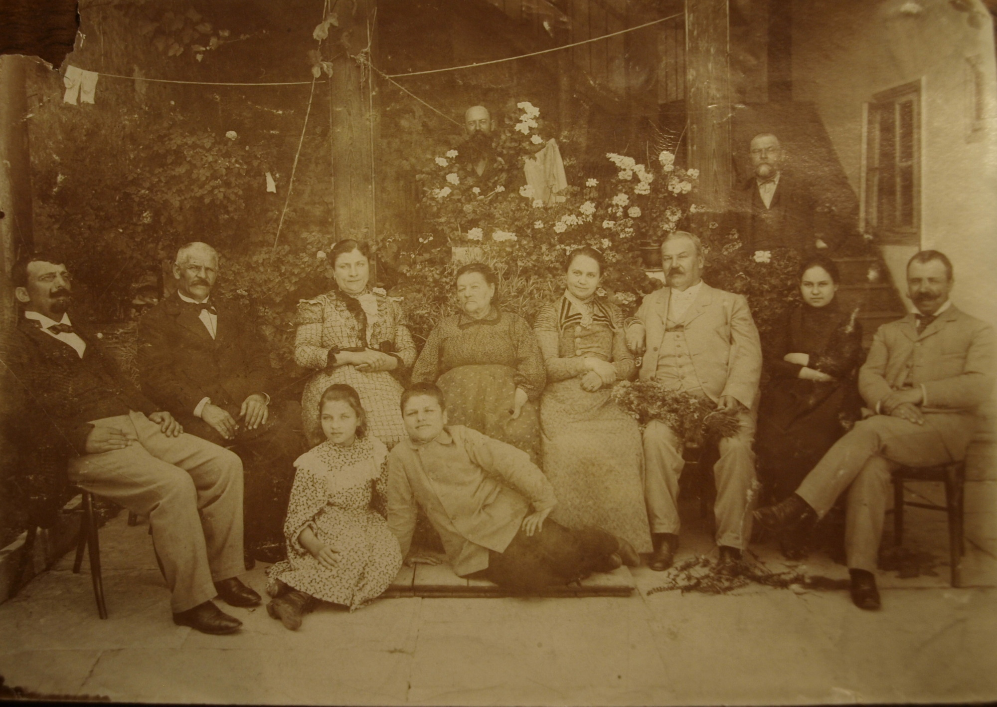 Анастасия Златарска сред роднини и приятели в търновския си дом.